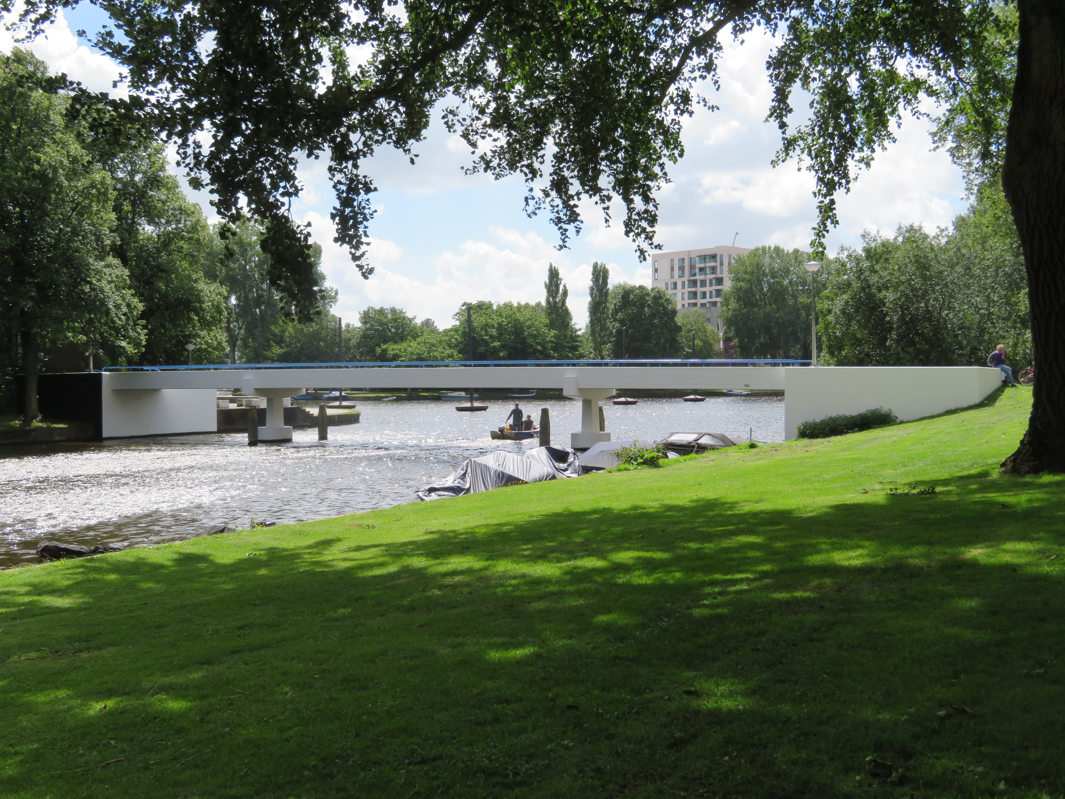 Brug 414 over het Zuider Amstelkanaal tussen de Achillesstraat en de Locatellikade in Amsterdam. Voetgangers en fietsersbrug